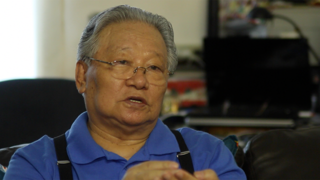 李振盛接受美国之音专访 (美国之音章真拍摄)